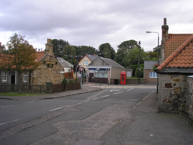 Links Road, Longniddry